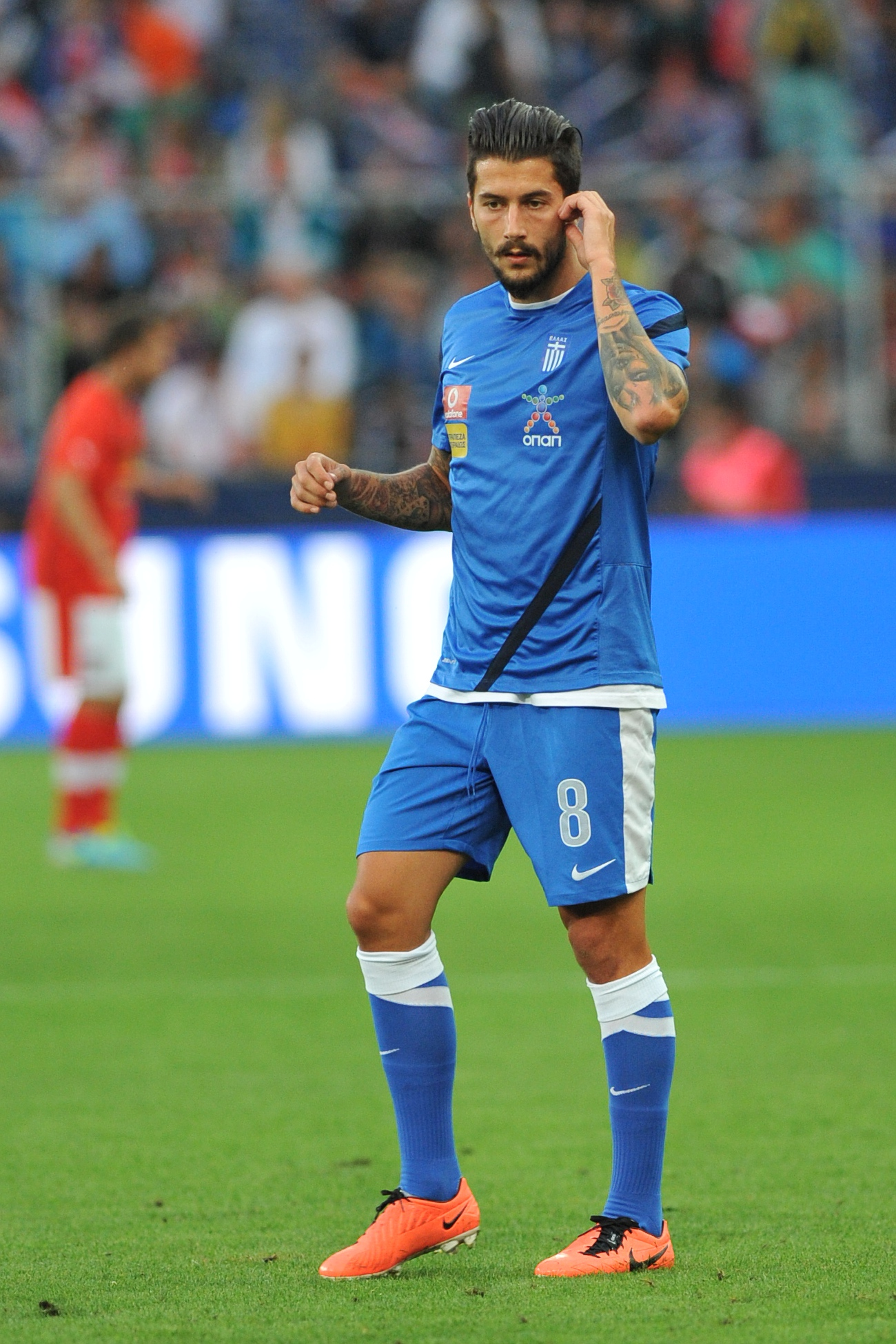 Freundschaftliches Länderspiel Österreich - Griechenland am 14. August 2013 in Salzburg: Panagiotis Kone